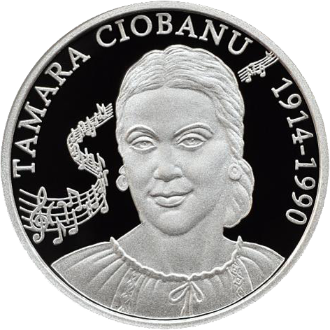 Реверс памятной монеты "100 лет со дня рождения Тамары Чебан"